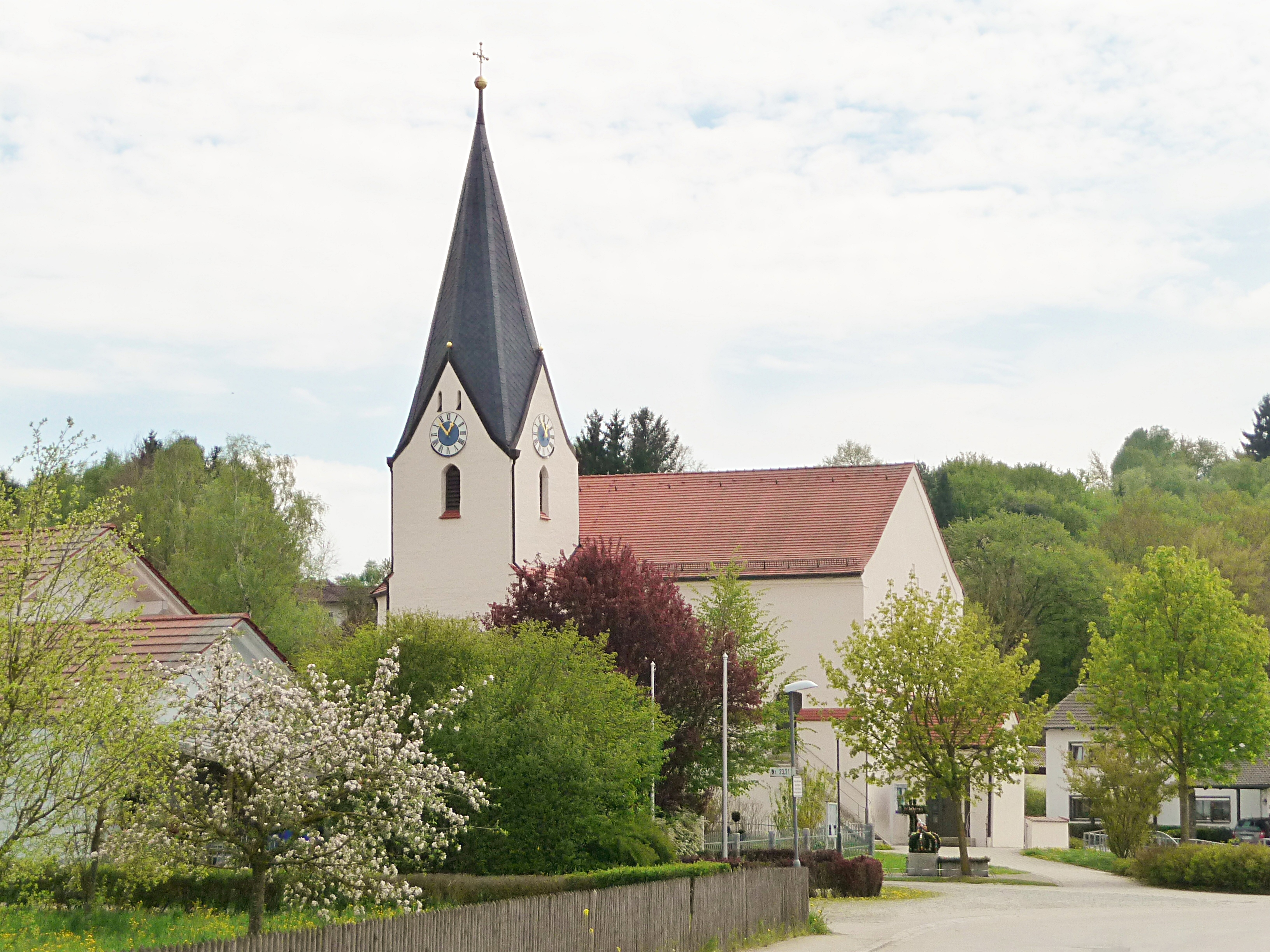 Die Kirche St. Petrus in Bubach